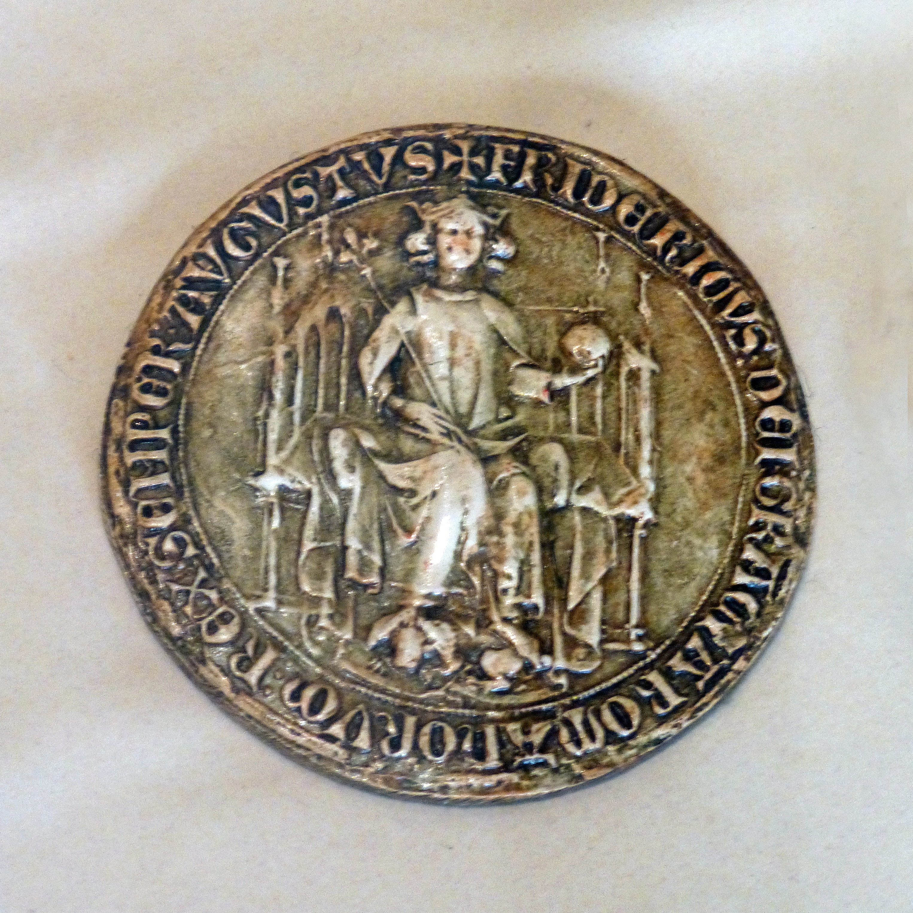 Sceau (reproduction) 1293 : Adolphe de Nassau élève Kaysersberg au rang de ville impériale. Musée historique de Kaysersberg